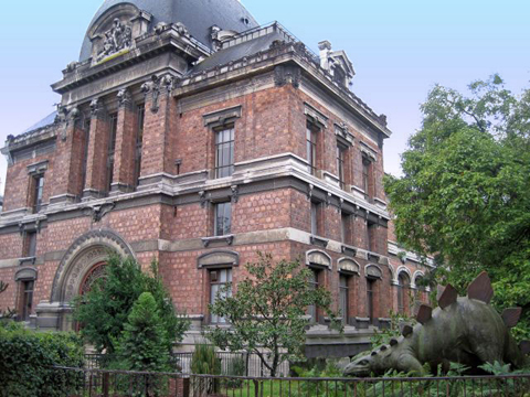 La galerie de Paléontologie et Anatomie comparée du muséum national d'Histoire naturelle de Paris, avec la reconstitution de Stégosaure.